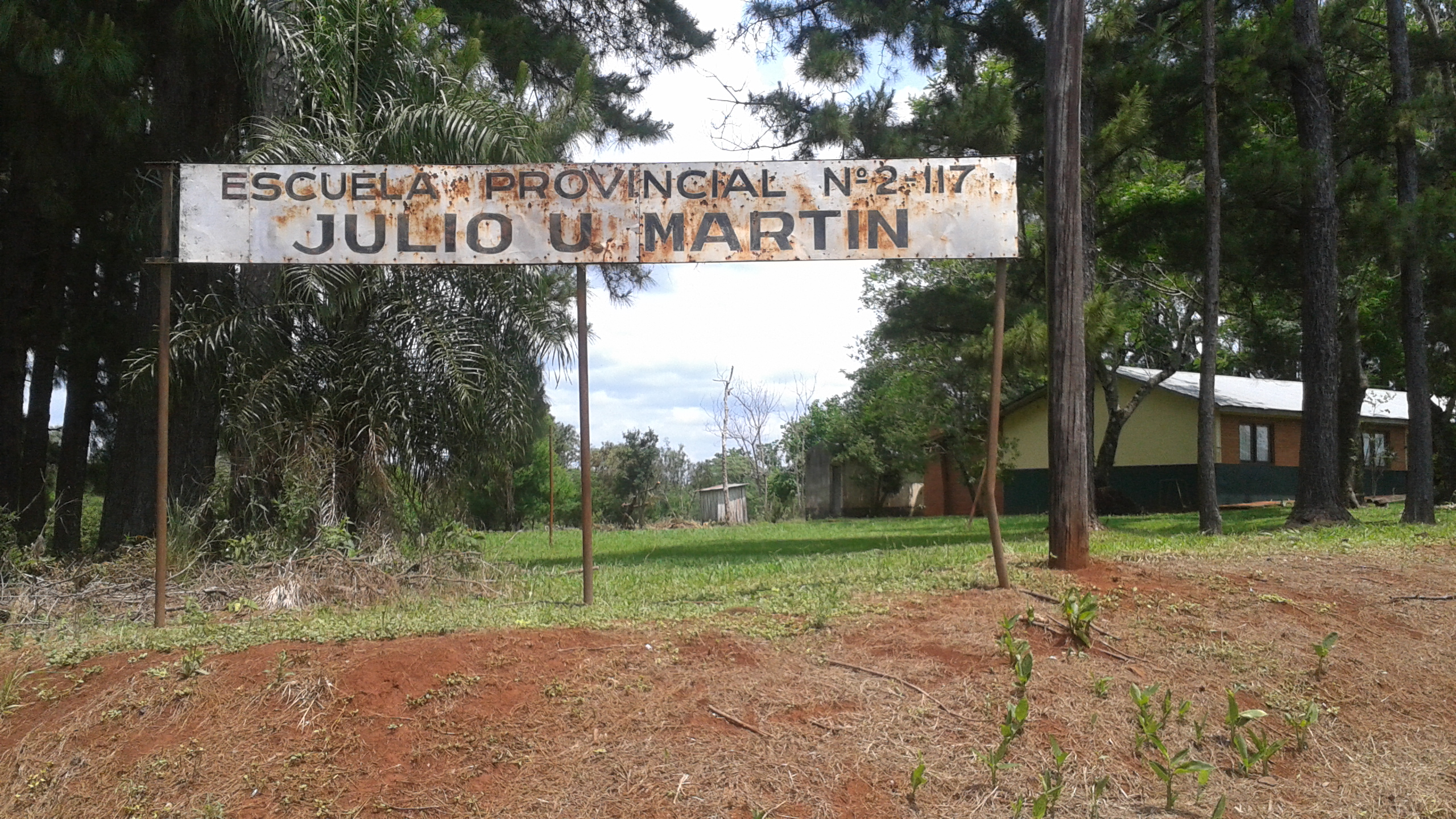 Escuela Provincial Nº 2-117 "Julio U. Martín" en Puerto Mineral (Provincia de Misiones, Argentina). Fuenteː Periodista Horacio Cambeiro.